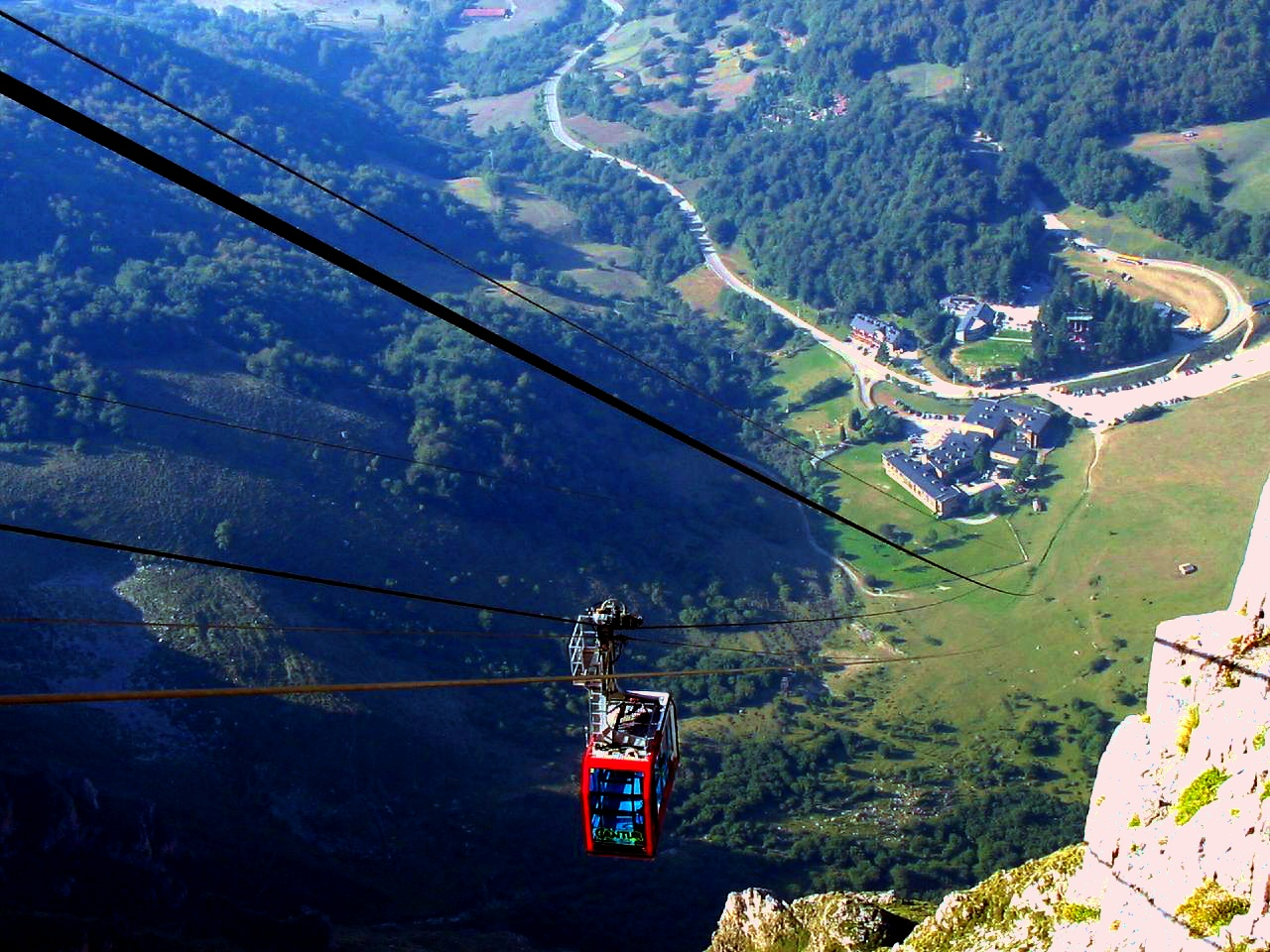 Teleférico de Fuente Dé en Cantabria (España)